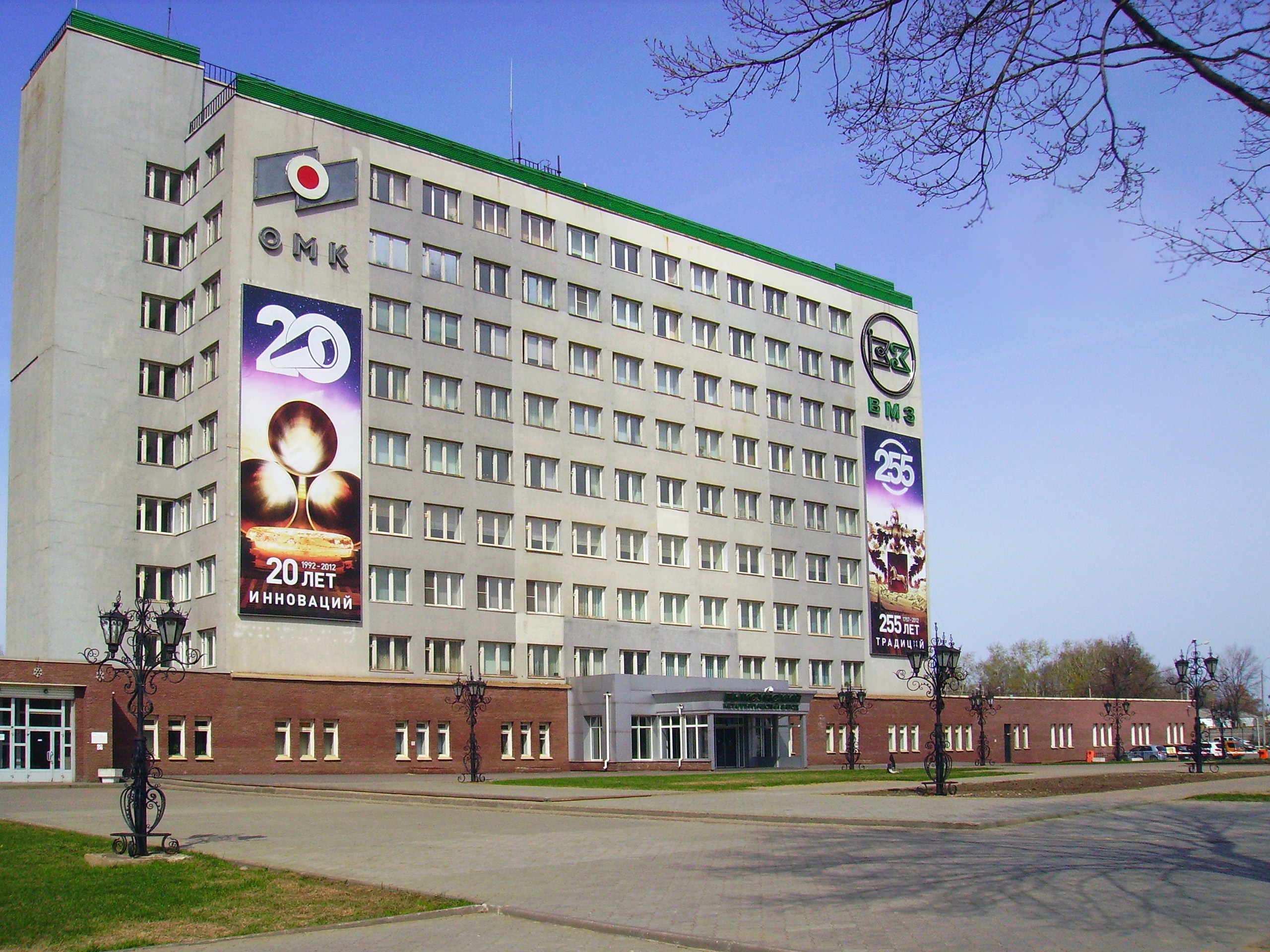 Выкса. Администрация металлургического завода.